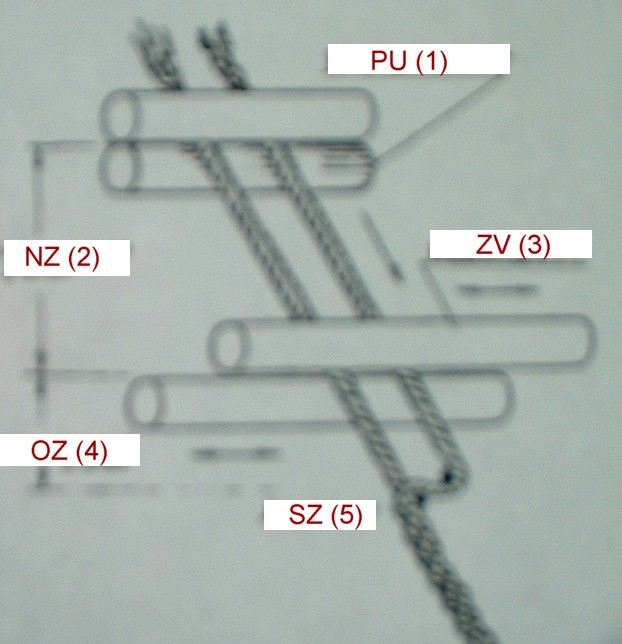 Schema:Self-Twist-Spinnsystem